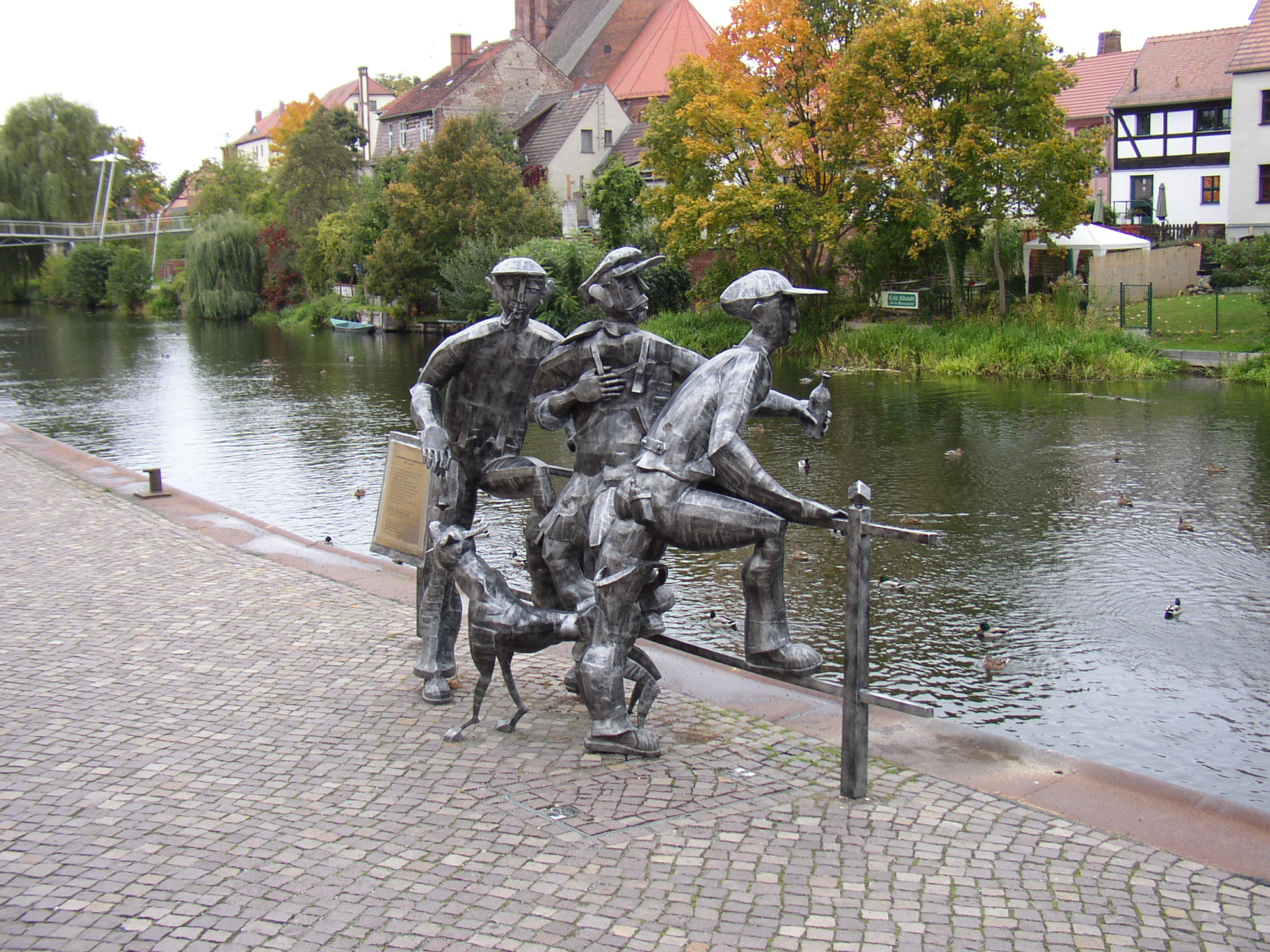 Die Figurengruppe Schleusenspucker wurde im Jahre 2006 vom Rathenower Bildhauer Volker-Michael Roth aus Anlass der Eröffnung der Landesgartenschau in Rathenow geschaffen.